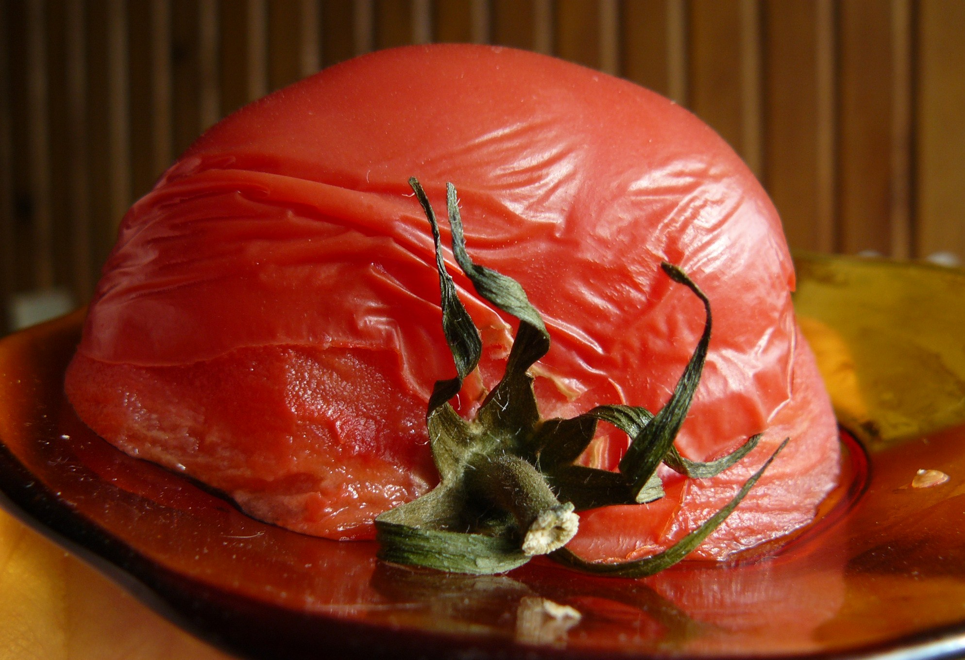 Sparzony pomidor (połówka).